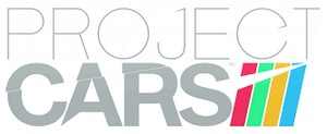 Logo of Project CARS video game in 2015.